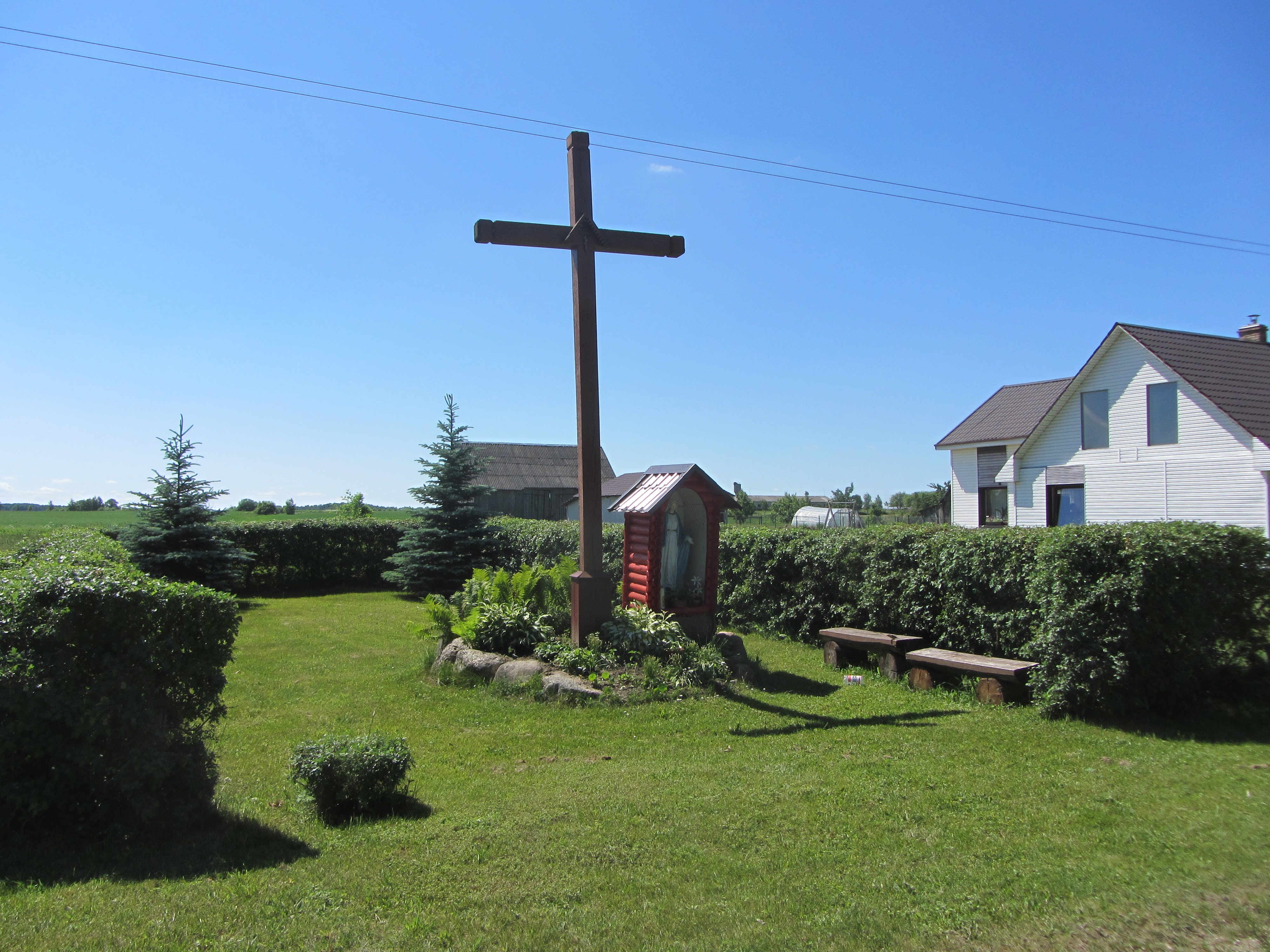 Gudulinė, Lithuania